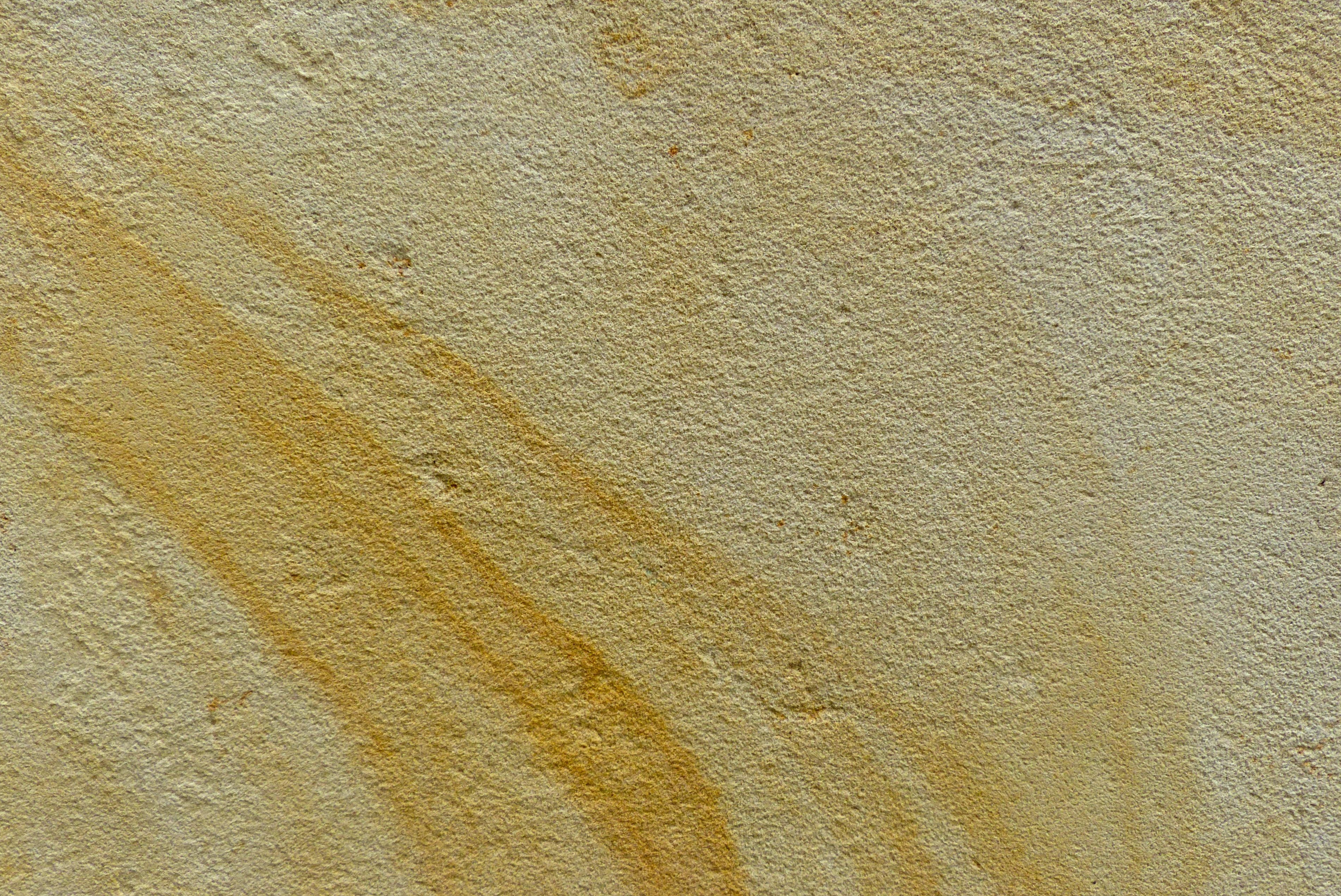 Herzogenrather Sandstein am Aachener Rathaus